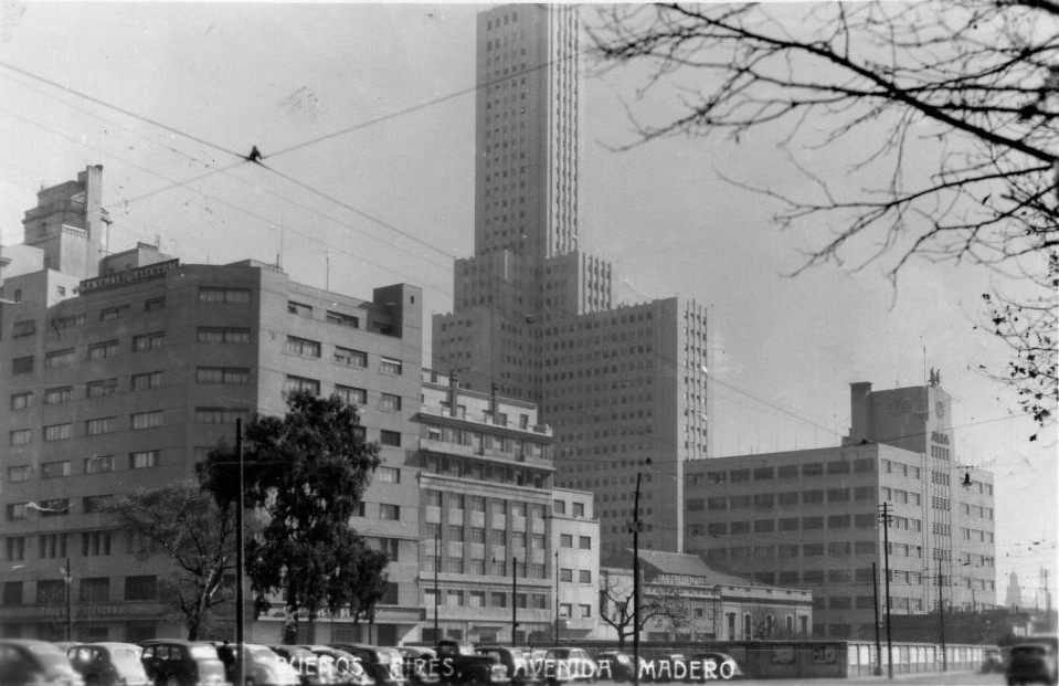 Tarjeta postal enviada en 1955, editor desconocido. Se ve la Avenida Madero en Buenos Aires, desde la calle Tucumán mirando hacia el norte. Asoma el edificio ALAS y el edificio de la editorial ALEA. Los edificios en primer plano fueron demolidos para la construcción del Edificio del Diario La Nación.